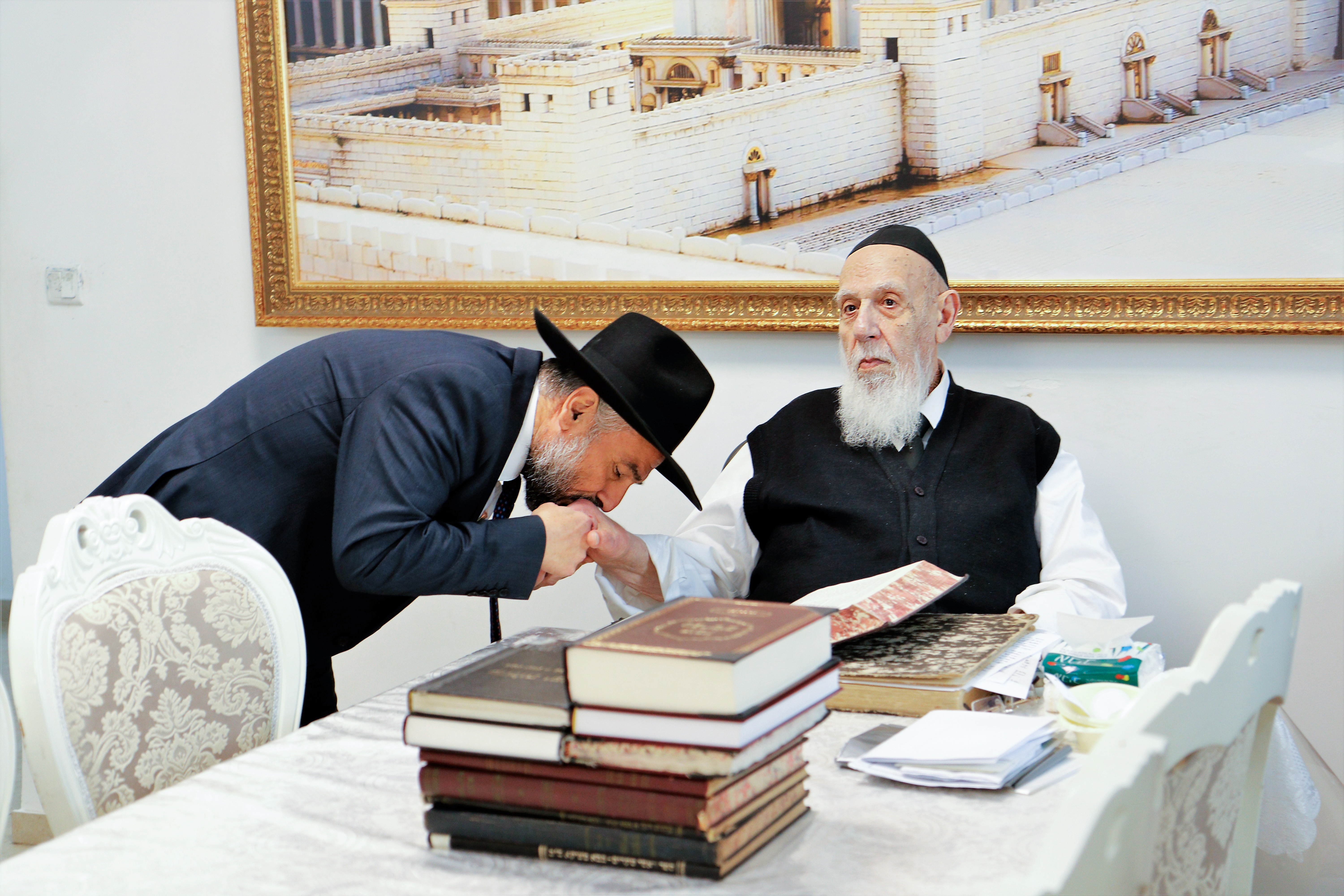 הרב משה אבוטבול עם חכם שלום כהן. פברואר 2020